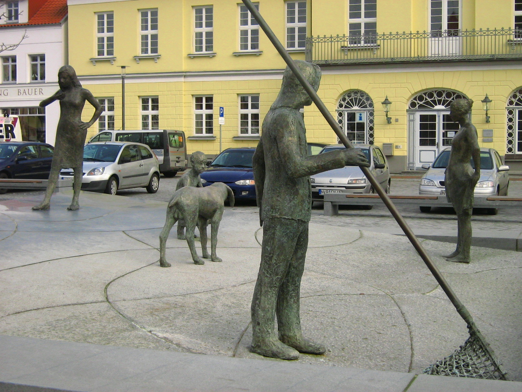 Ribnitz-Damgarten, mehrfiguriger Brunnen auf dem Marktplatz von Thomas Jastram